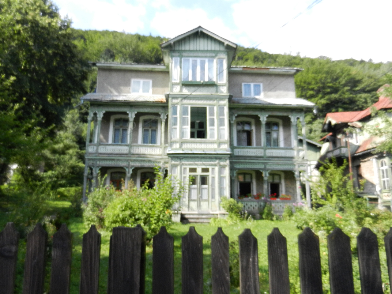 Casa Vasile Manole